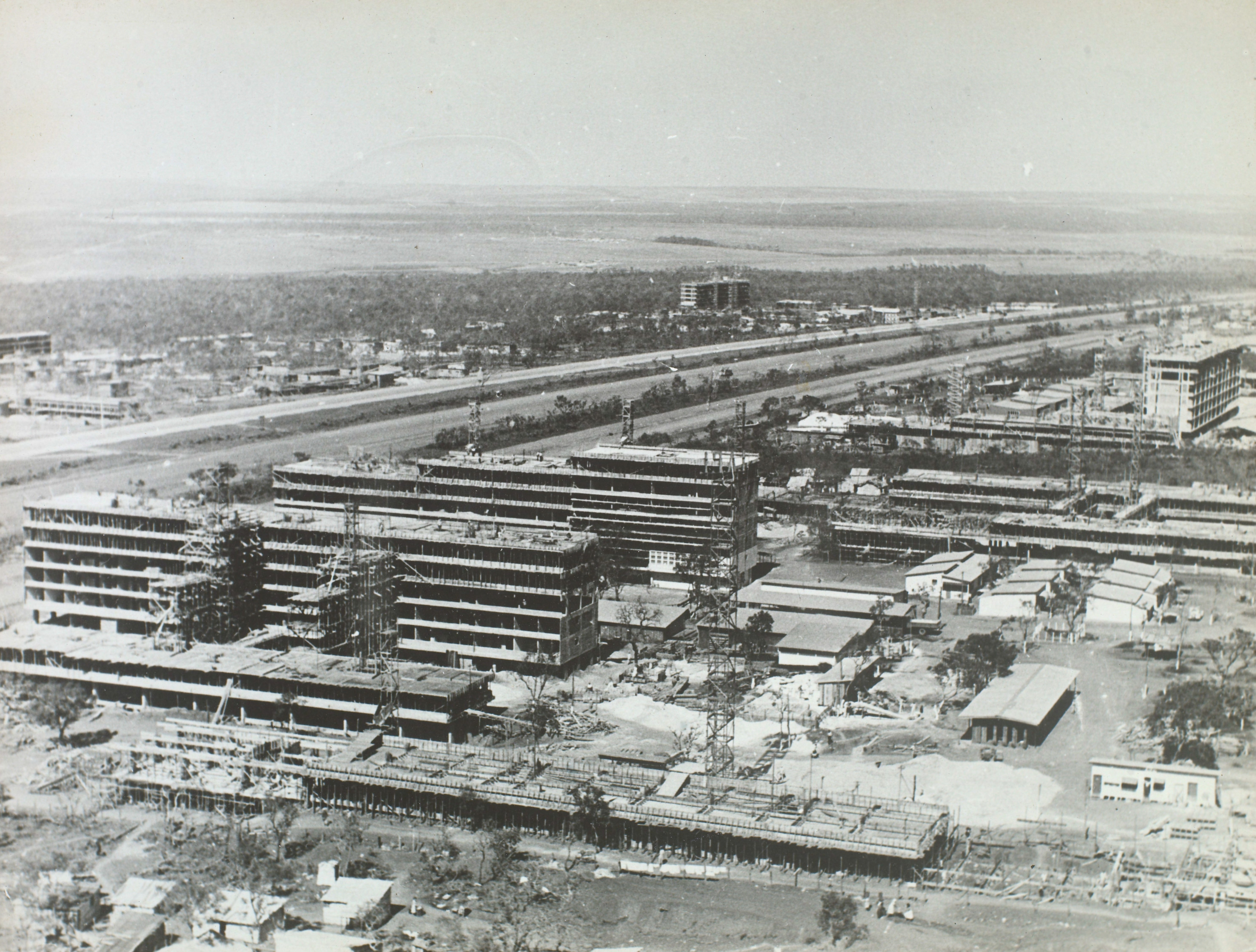 Fotografia do Fundo Correio da Manhã, sob a guarda do Arquivo Nacional.